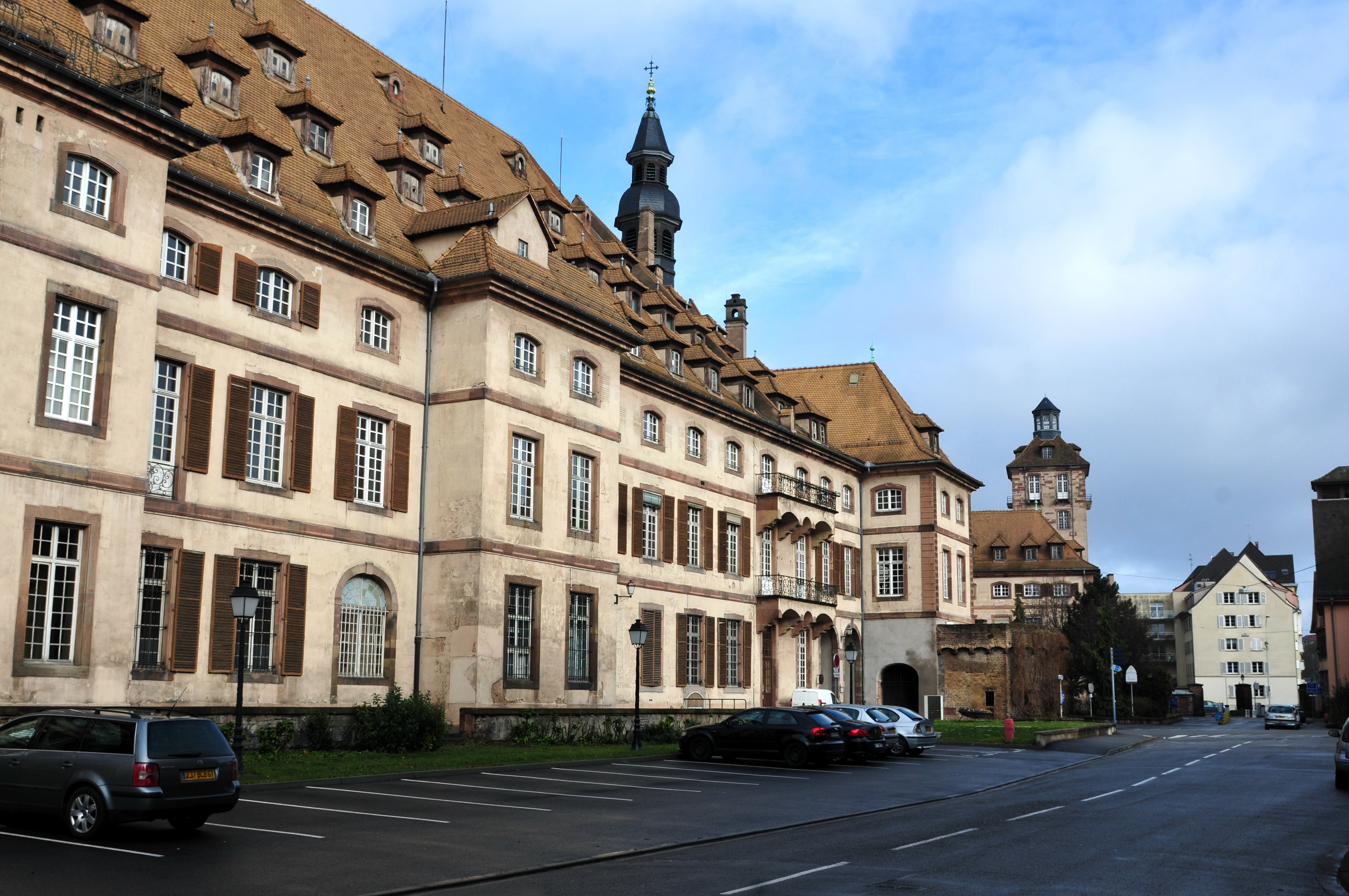 Straßburg European Parliament 2014 3.–7. February 2014, StrasbourgThis photo has been created within the project "WIKI loves parliaments / European Parliament". Usage and Help If you have any questions concerning this picture or how to use it, feel free to